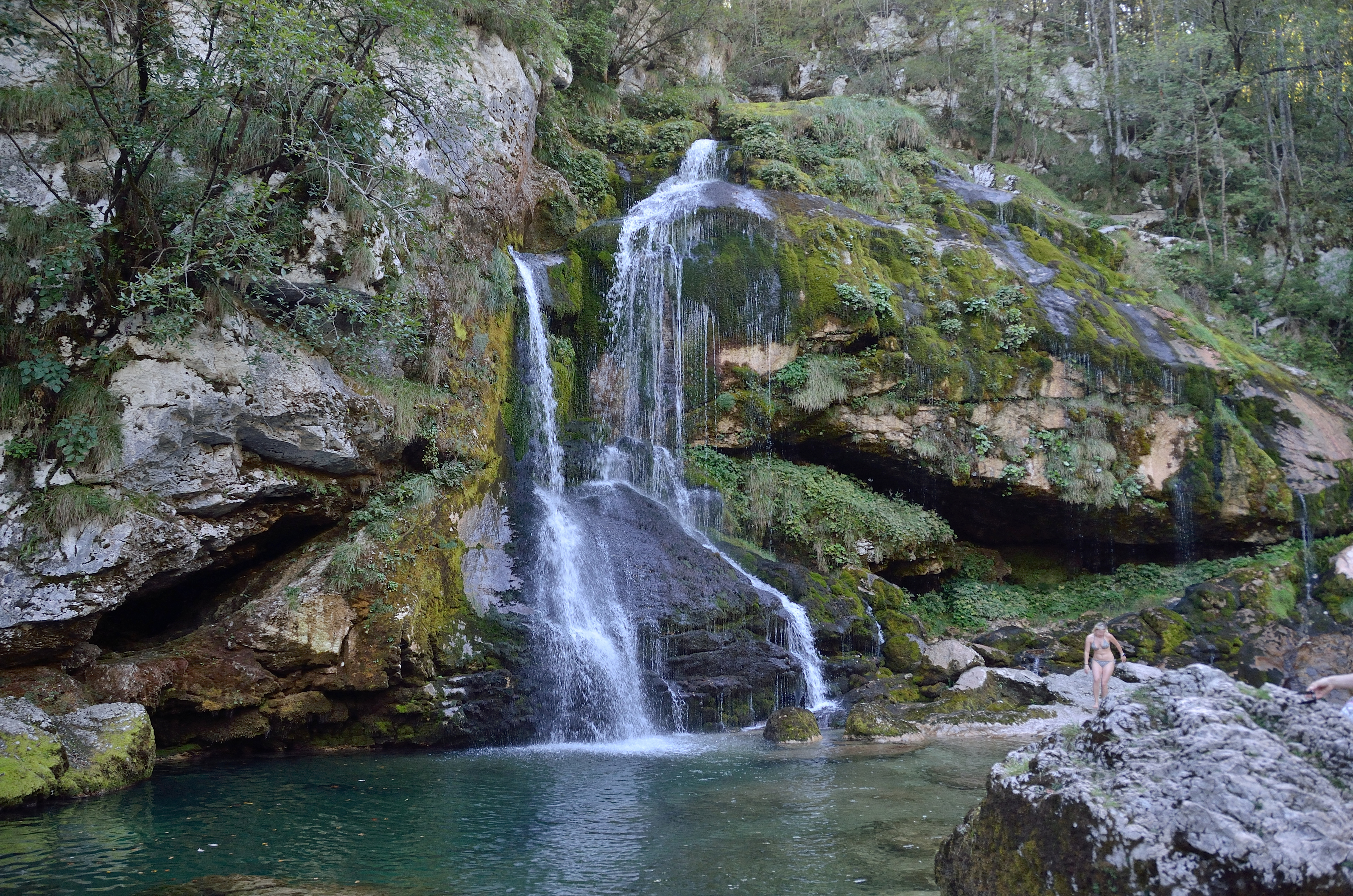 Slap Virje, Plužna